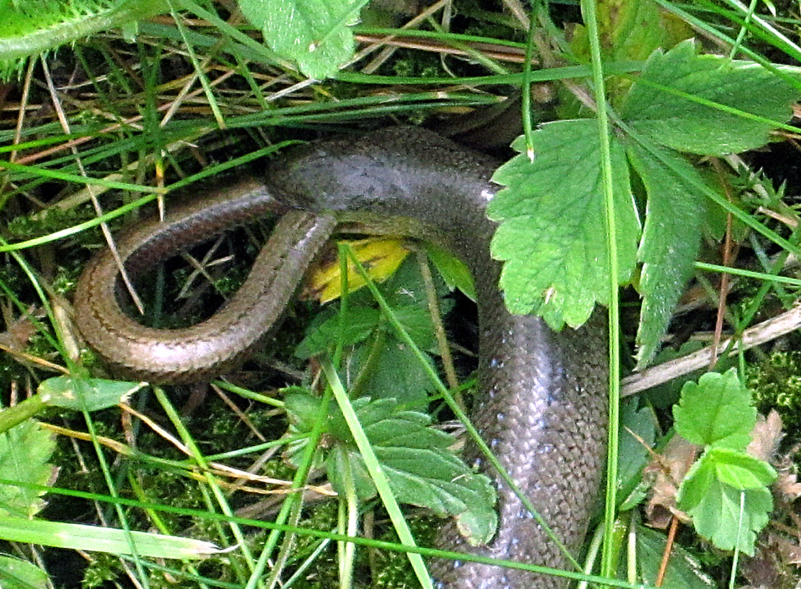 Blindschleiche, ein kleineres Exemplar fressend.